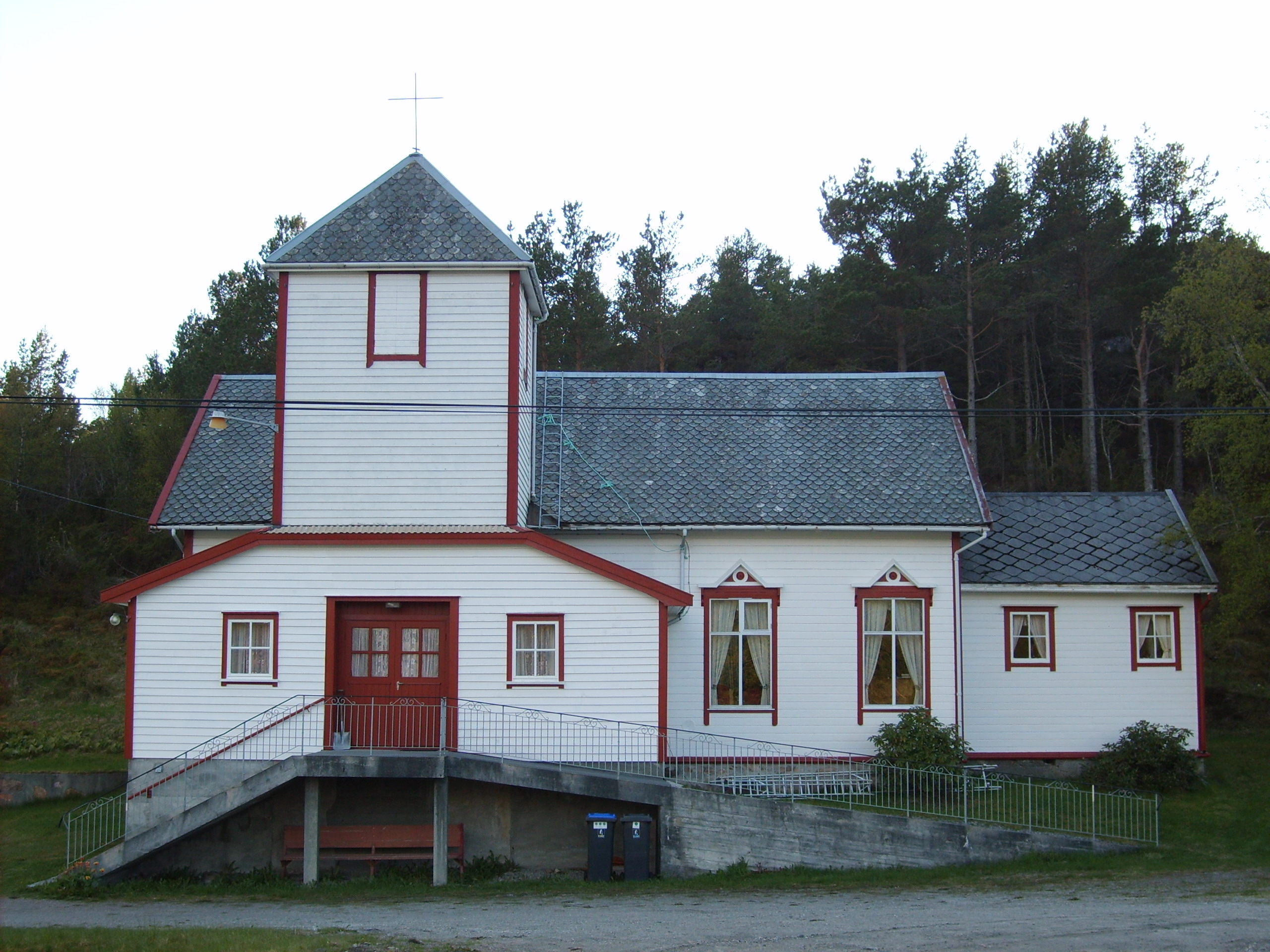 Sør-Tustna kapell. Foto: Olve Utne, fra Lokalhistoriewiki.